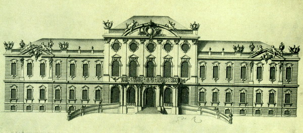 Покровське, палац: фасад палацу в селі Покровське